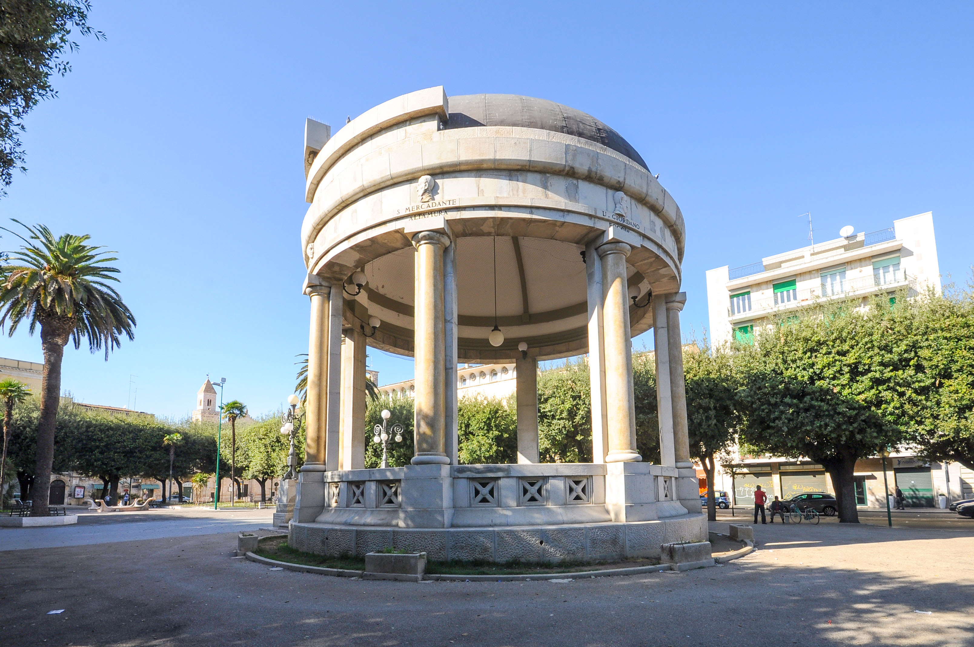 Cassarmonica This is a photo of a monument which is part of cultural heritage of Italy.